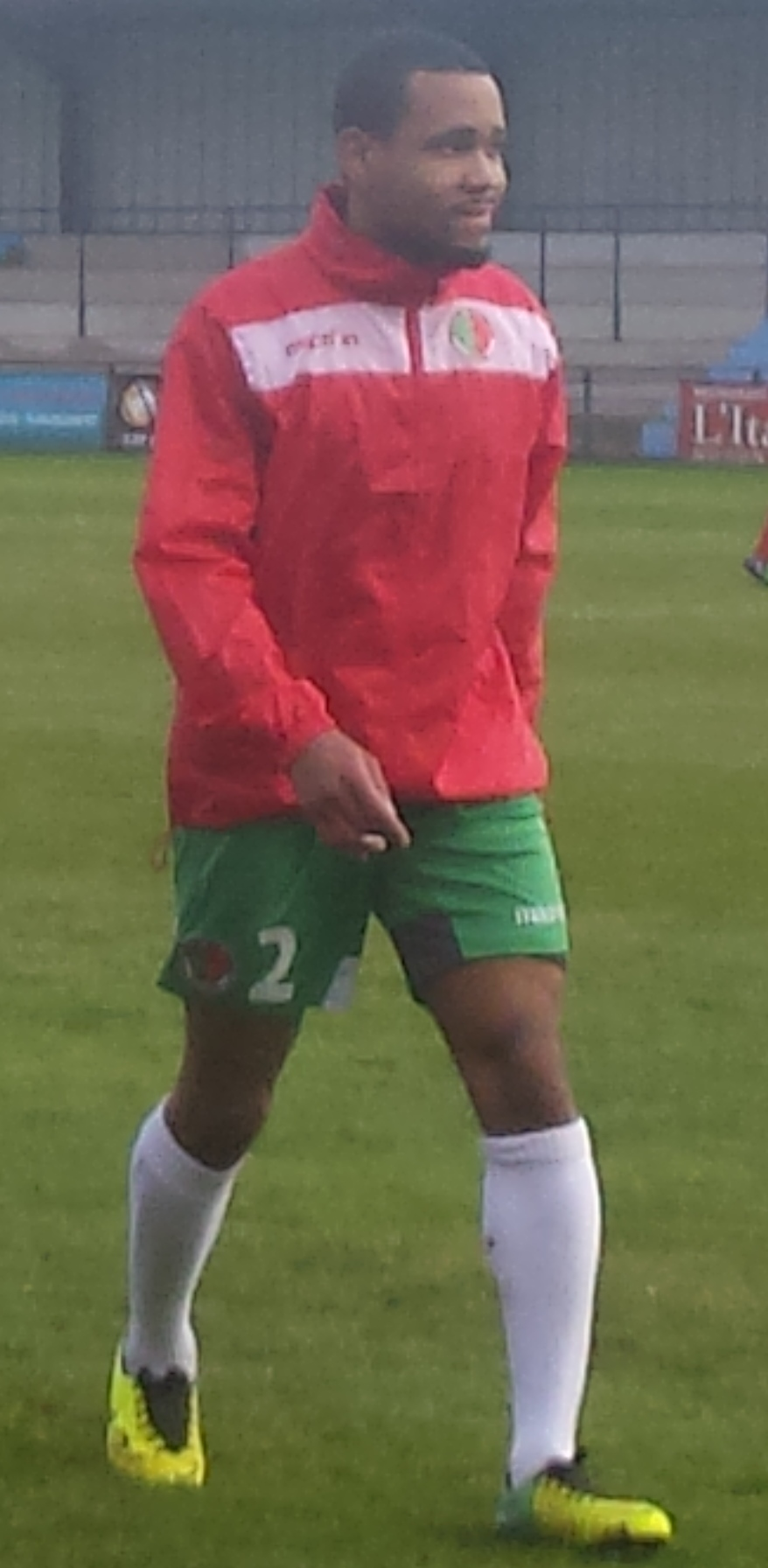 Alexandre Vardin avant la rencontre Lens B - Sedan, au Stade François-Blin d'Avion, match comptant pour le championnat de France de CFA (quatrième division française), le 24 janvier 2015